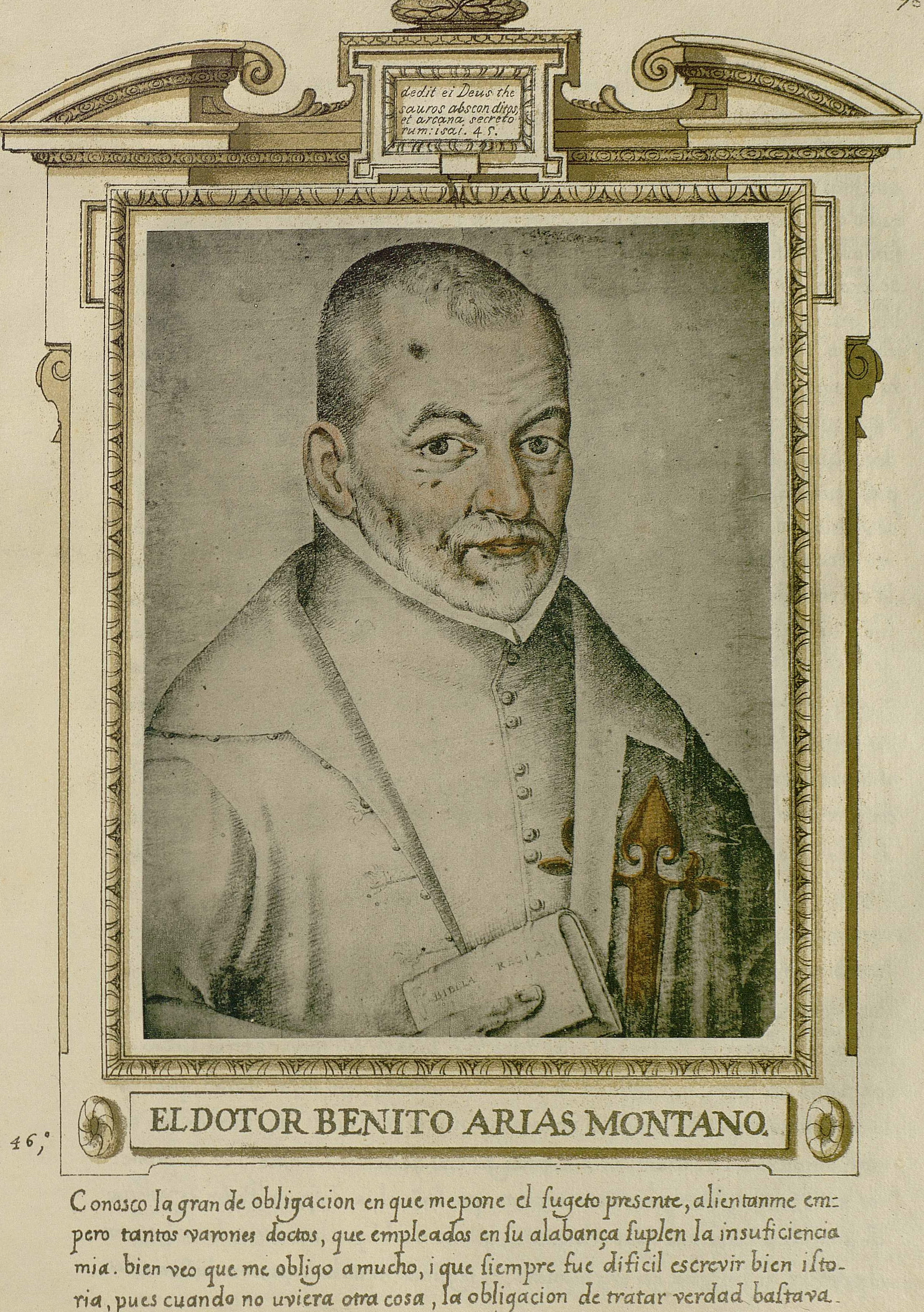 Benito Arias Montano, Libro de descripción de verdaderos retratos de ilustres y memorables varones, Madrid, Biblioteca de la Fundación Lázaro Galdiano